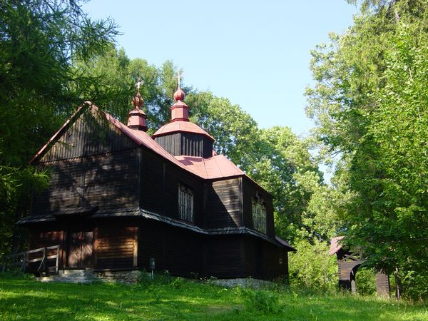 Moczary - dawna cerkiew greckokatolicka p.w. św. Mikołaja Biskupa, obecnie kościół rzymskokatolicki pw. Niepokalanego Serca NMP. Autor: wikipedysta:Frankee, 2005